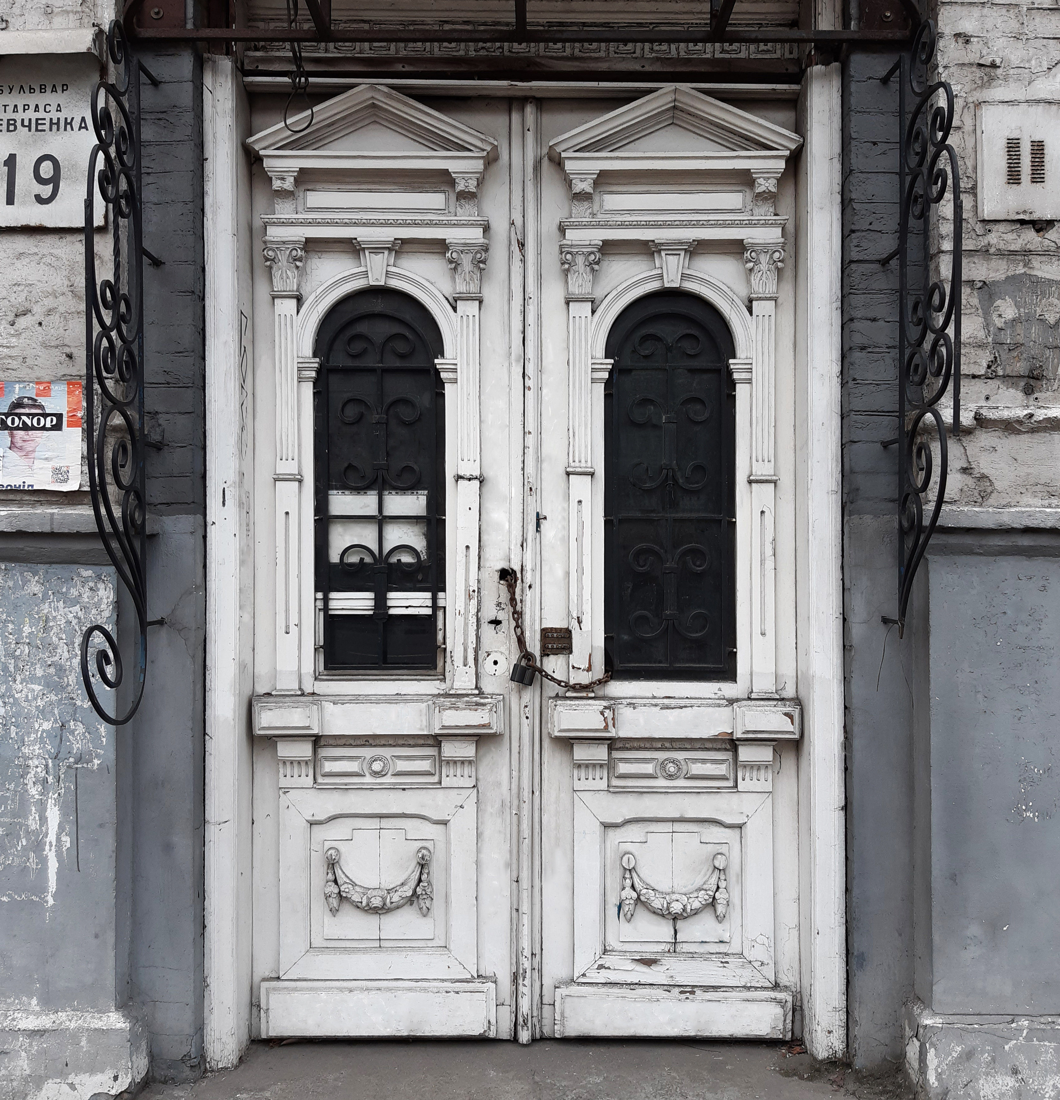 Будинок із драконами 1894 року, Київ, бульвар Тараса Шевченка, 19